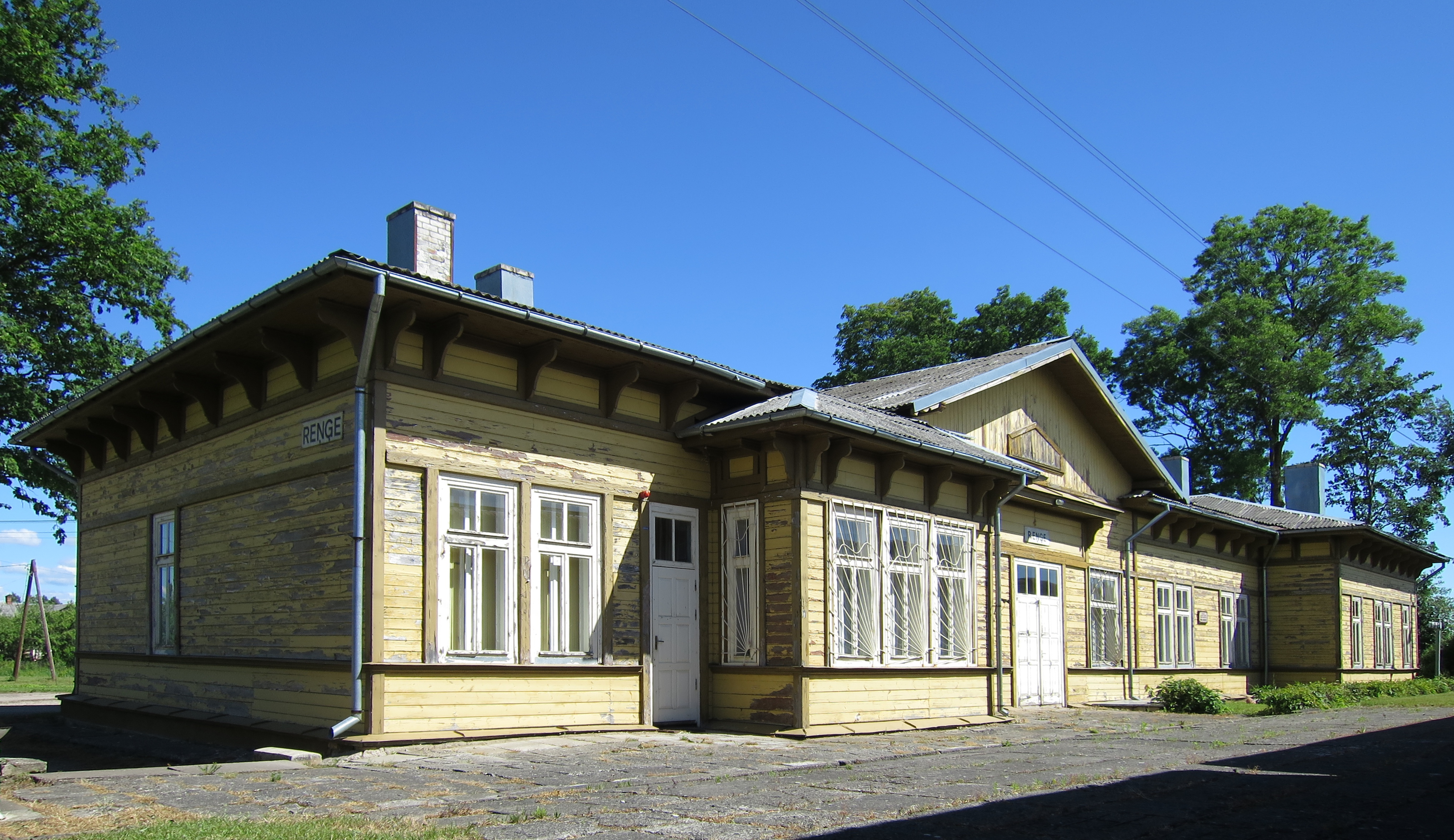 Reņģes stacijas ēka